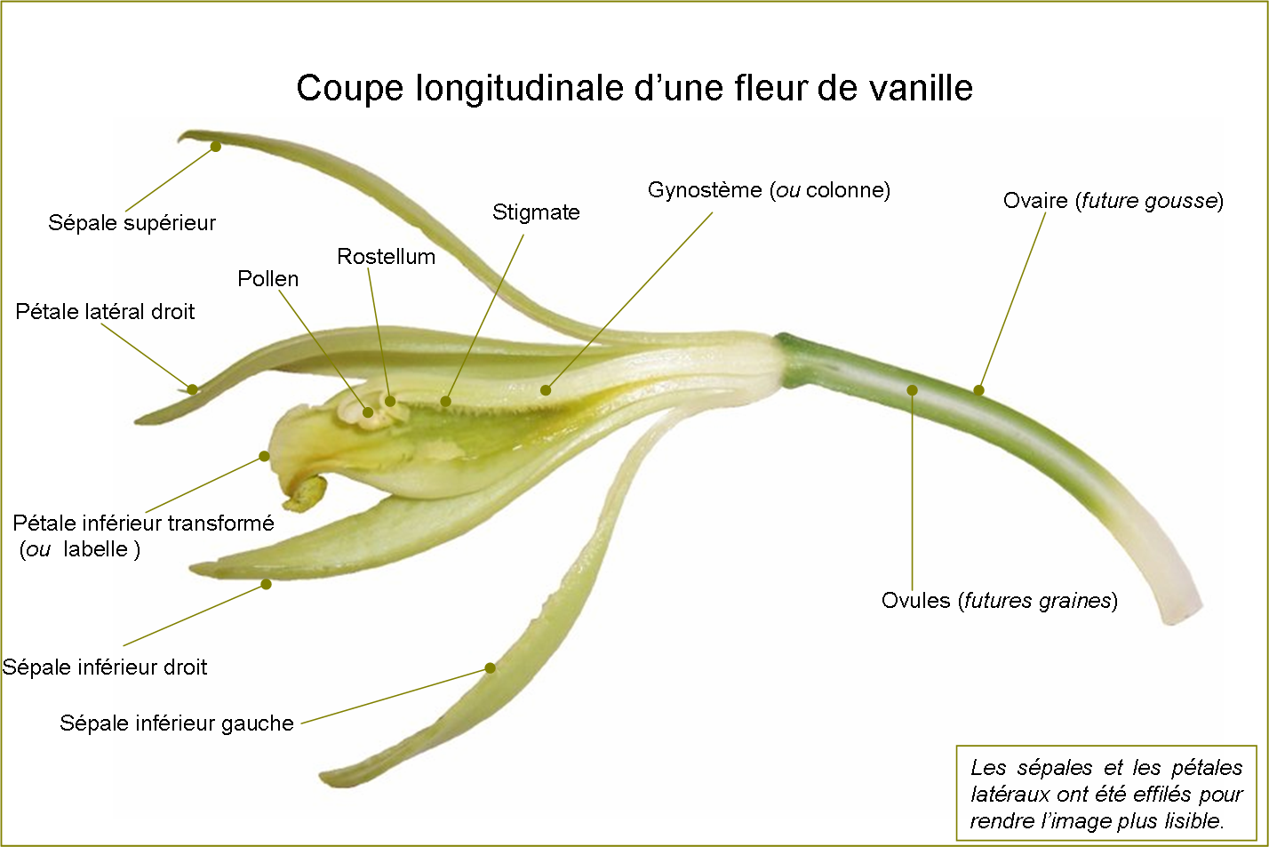 Photo & caption : B.navez - JAN 2006